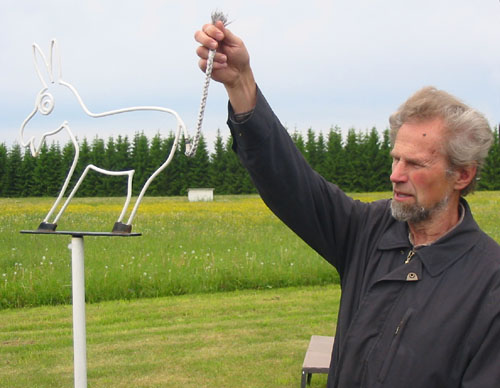 Meteoroloog Ain Kallis selgitamas burromeetri tööpõhimõtet